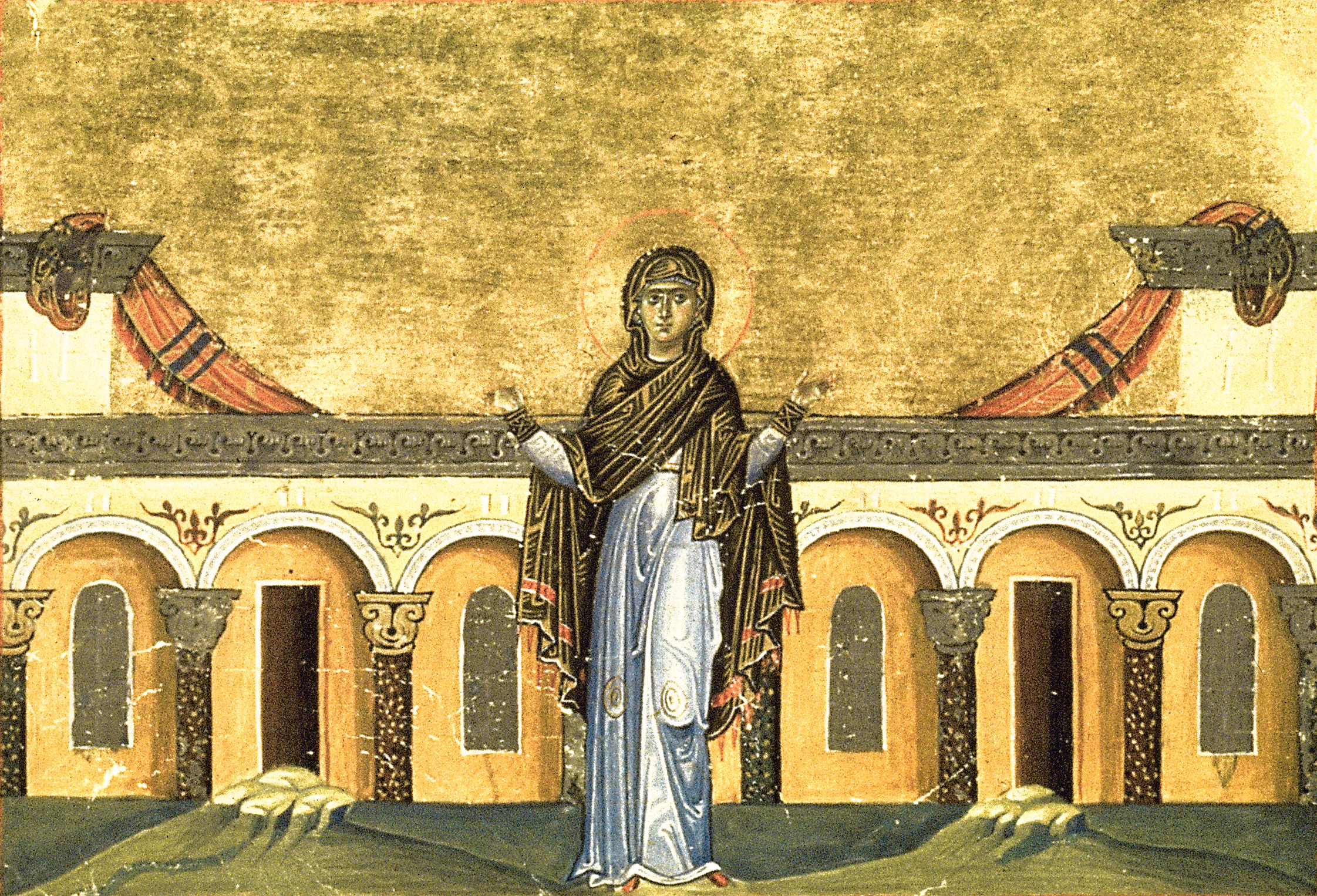 Синклитикия Александрийская, прп. Константинополь. 985 г. Миниатюра Минология Василия II. Ватиканская библиотека. Рим.